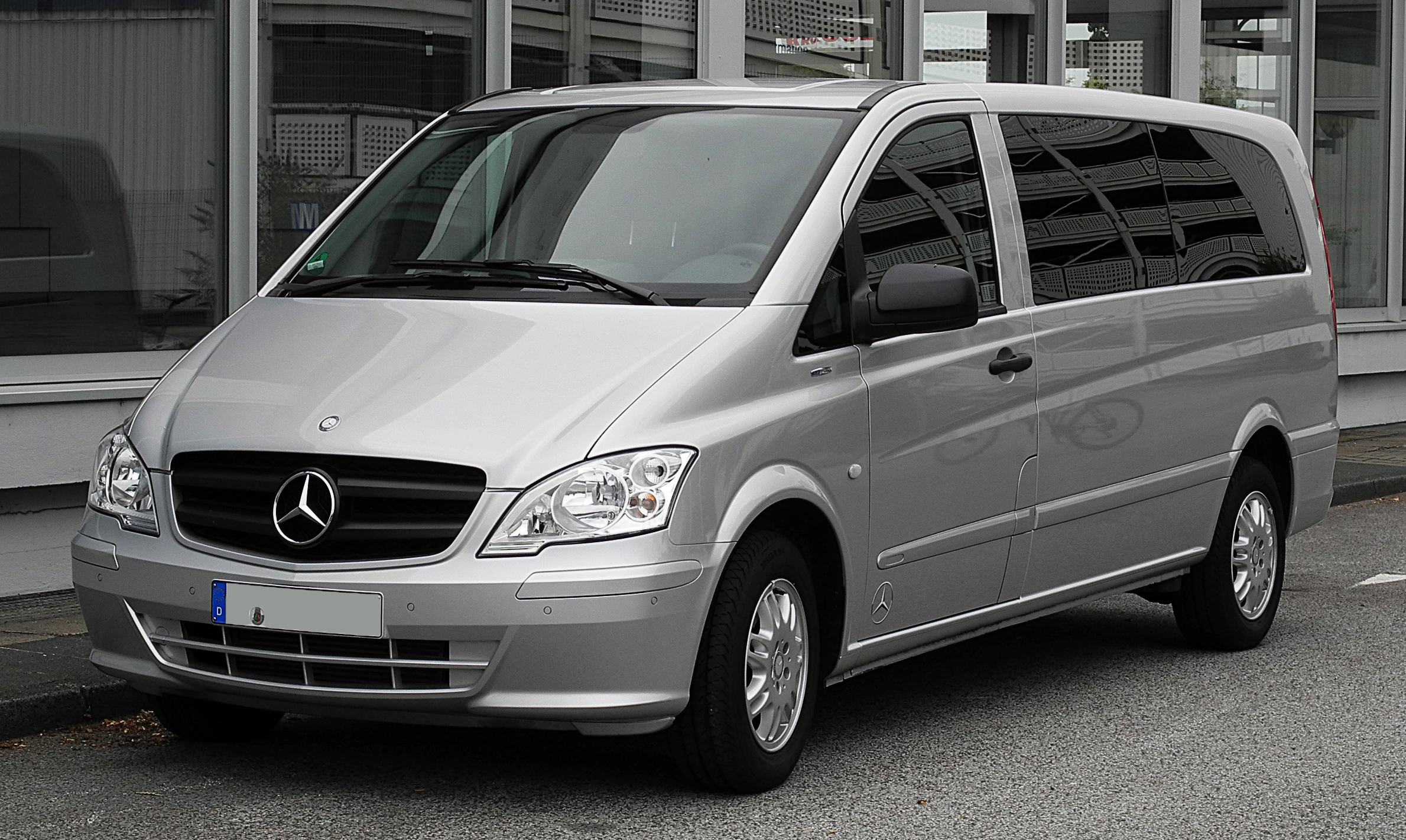 Mercedes-Benz Vito Kombi Extralang 116 CDI BlueEFFICIENCY (V 639)